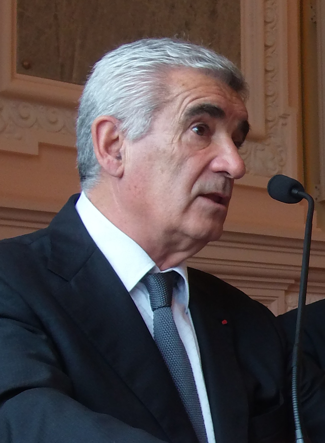 Gérard Trémège, Maire de Tarbes, déclare Robert Kaddouch, citoyen d'honneur de la ville de Tarbes. Mardi 12 Juillet 2016